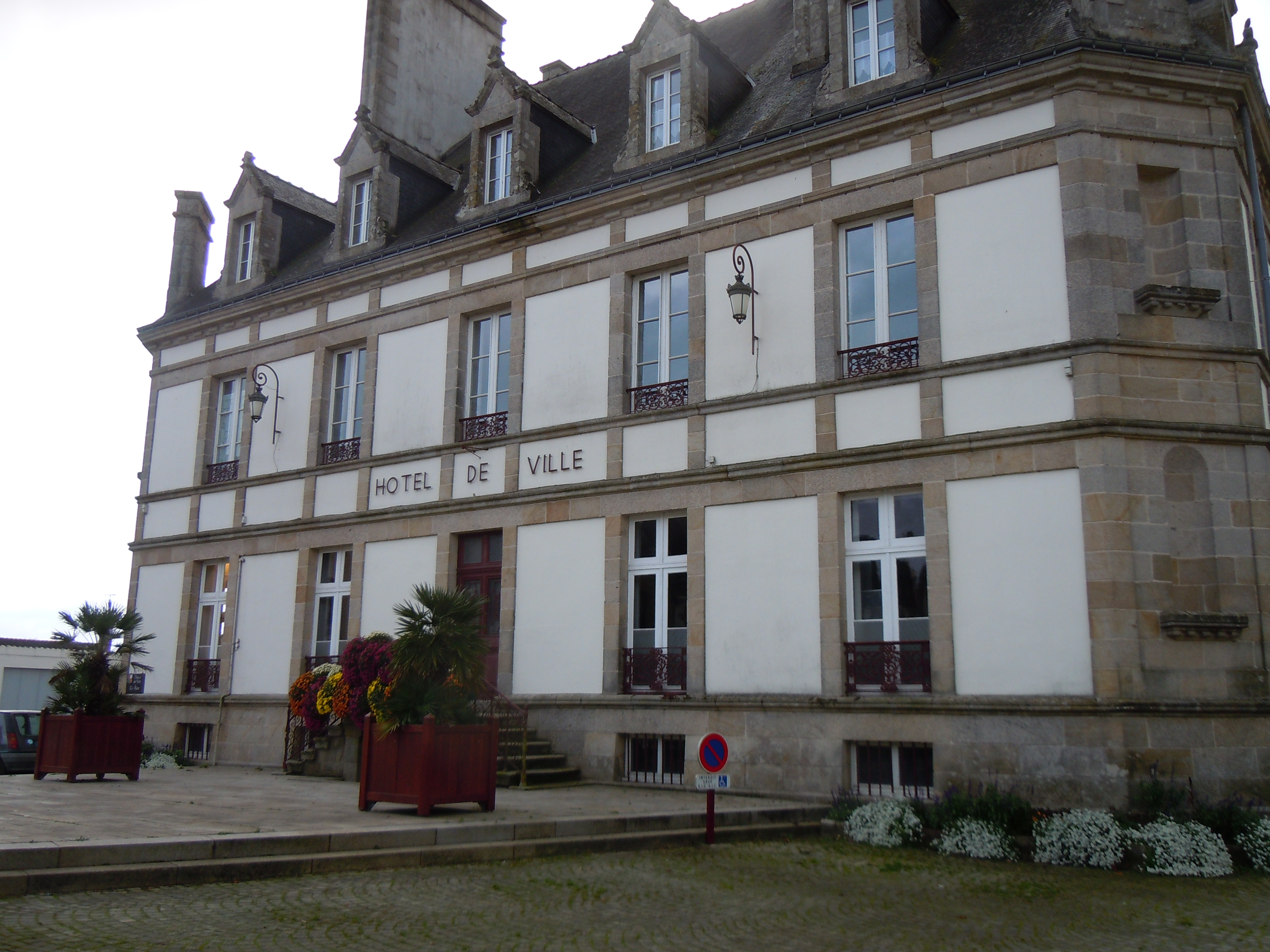 mairie de Guémené-sur-Scorff (département du Morbihan)